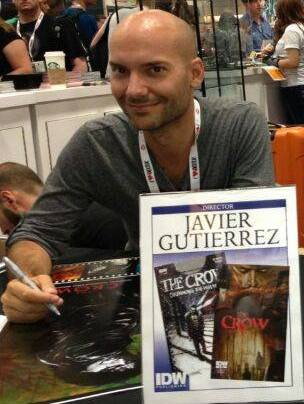 Javier Gutierrez y James O'Barr juntos en el San Diego Comic-Con 2013